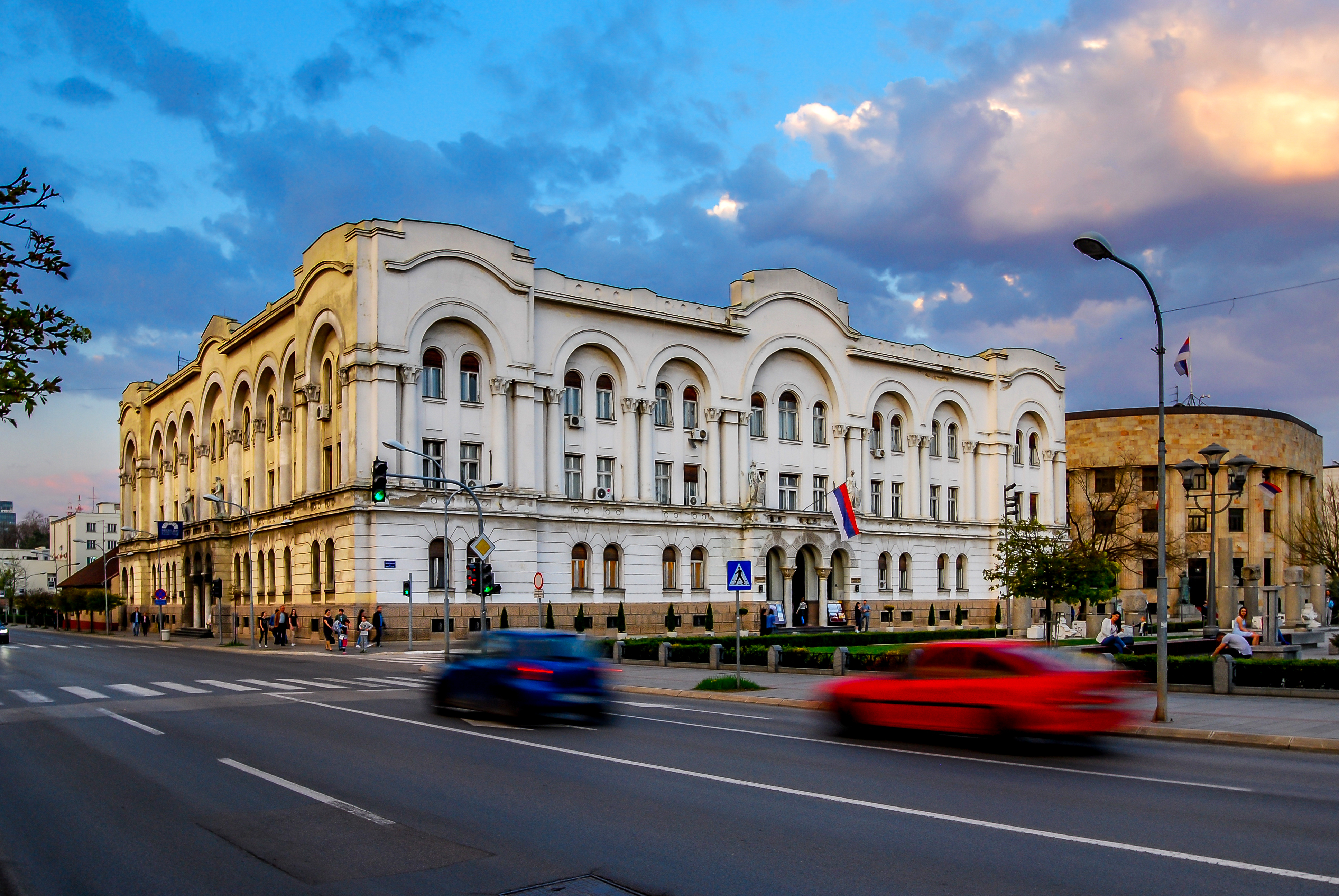 Банова палата, Бања Лука Банова палата, Бања Лука ID добра: NKD006 Банова палата